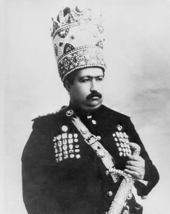 Mohammad Ali Shah, (1907-1909)